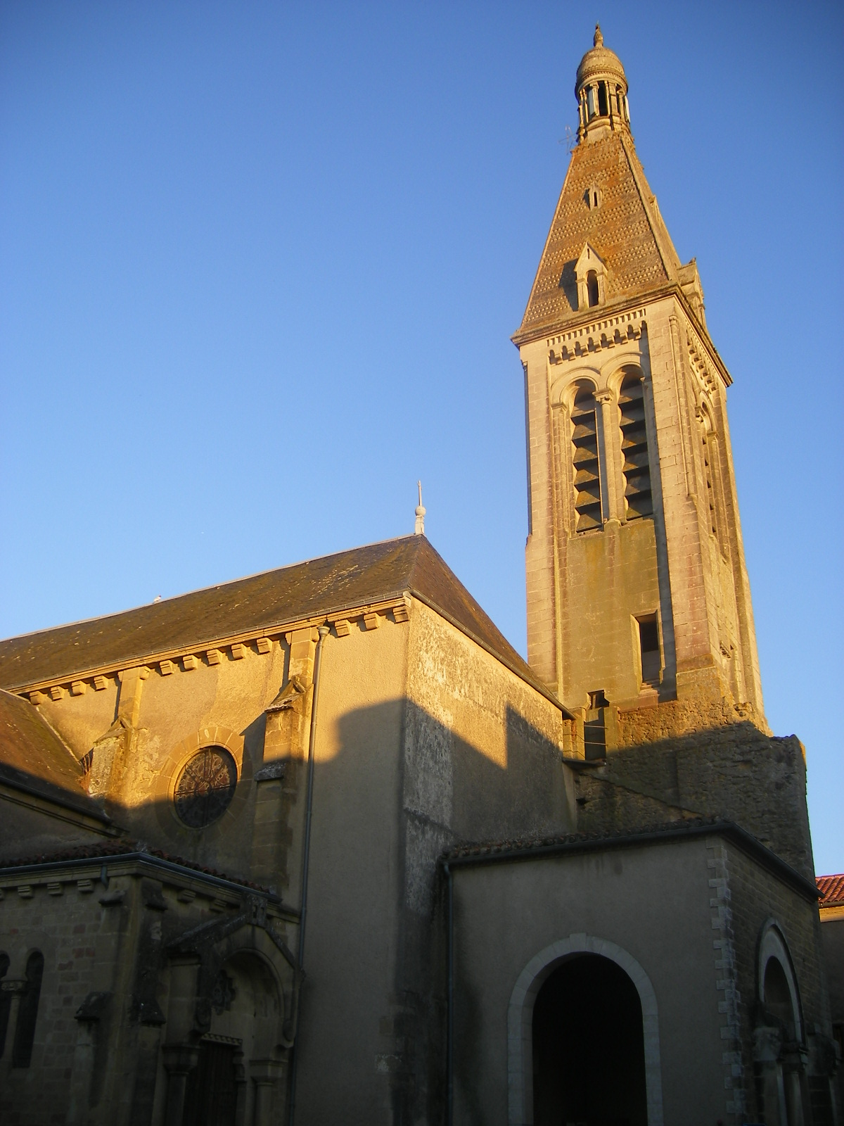 Miélan